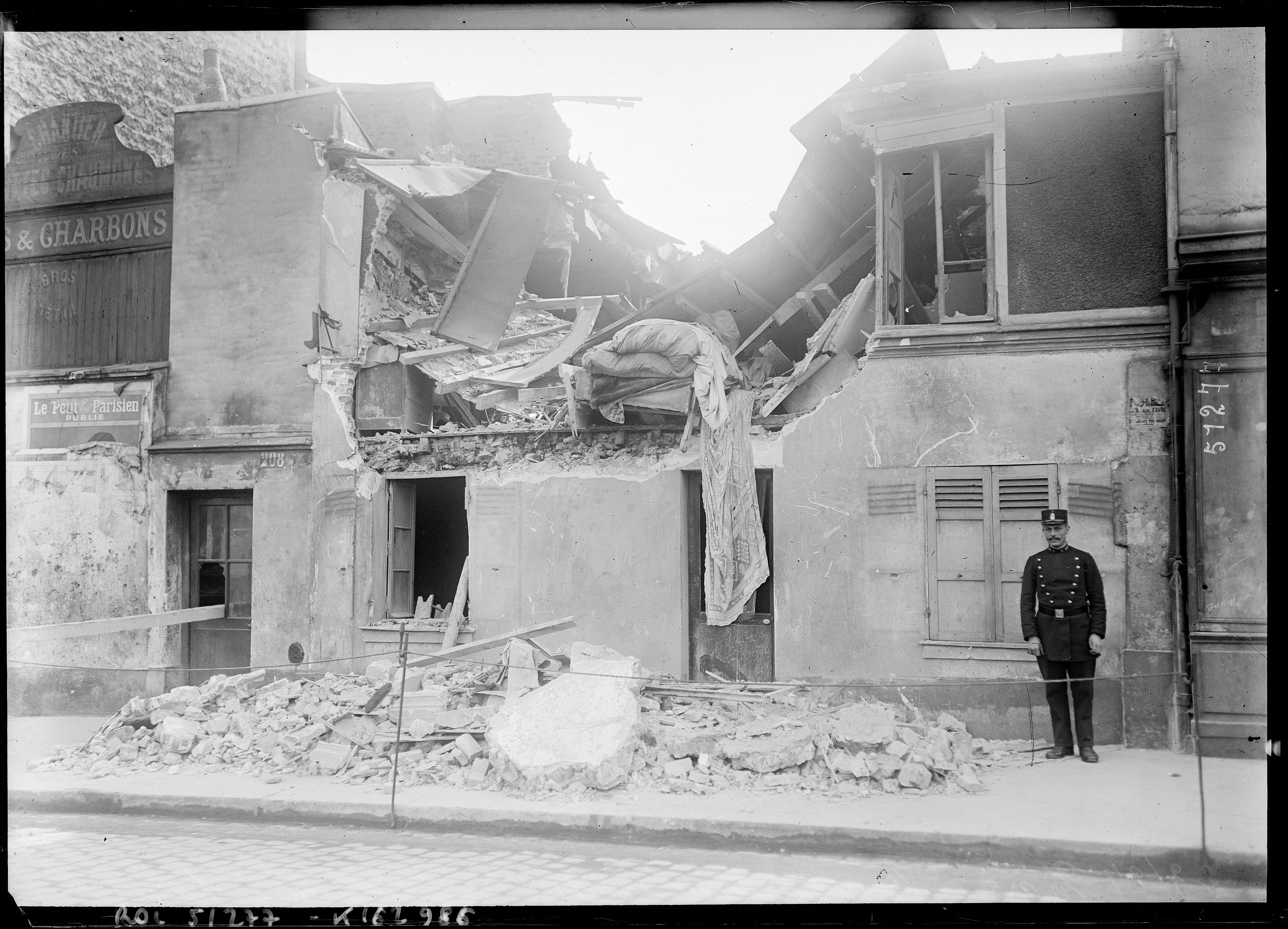 Le 200 bis quai de Jemmapes à Paris après le bombardement à longue portée de la Grosse Bertha